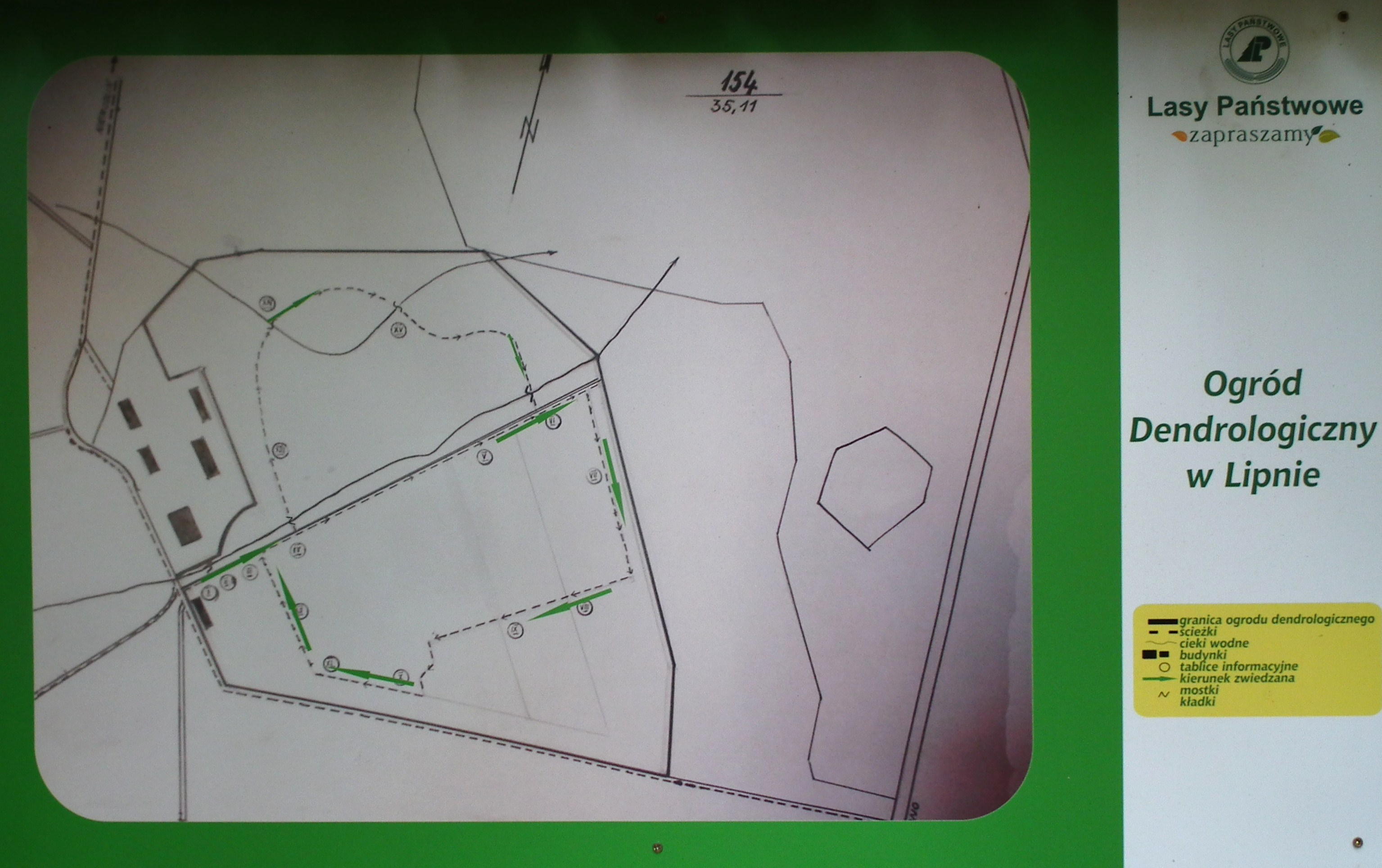 Arboretum w Lipnie pod Niemodlinem.